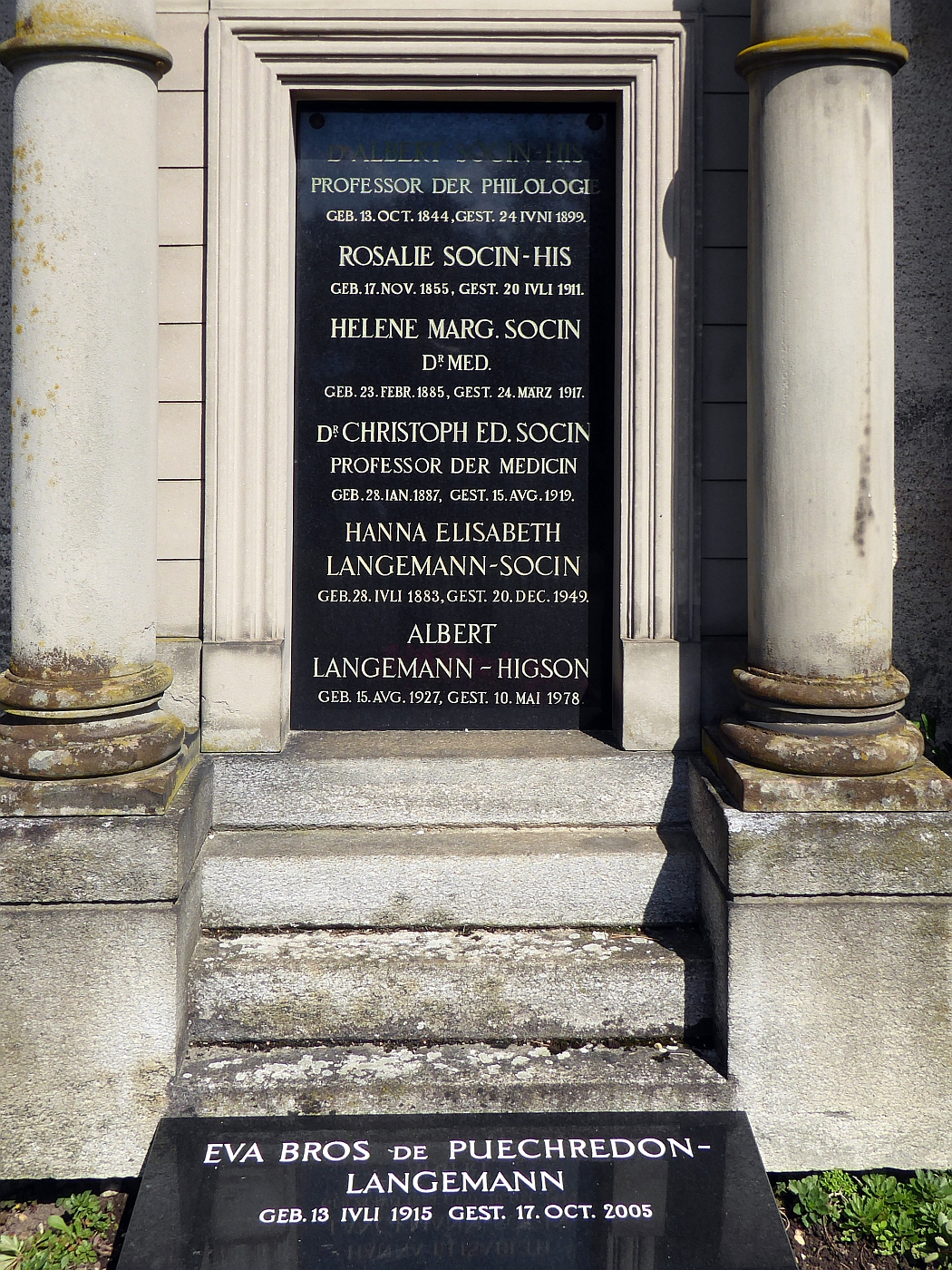 Albert Socin (1844–1899) Professor der Philologie, Orientalist, Alttestamentler. Professor der semitischen Sprachen. Grab auf dem Friedhof Wolfgottesacker, Basel